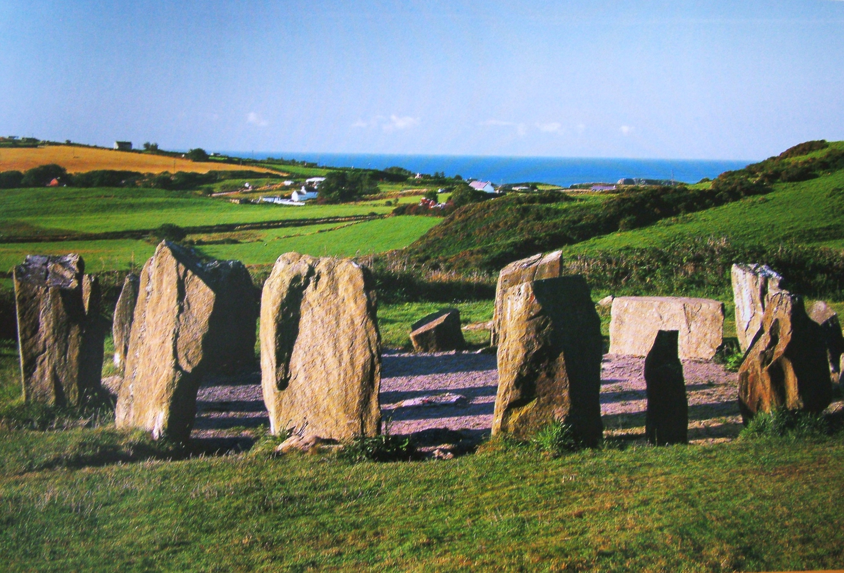 Beaghmore Stone Circles (Írország)